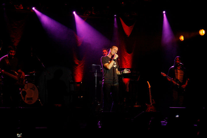 En la trastienda